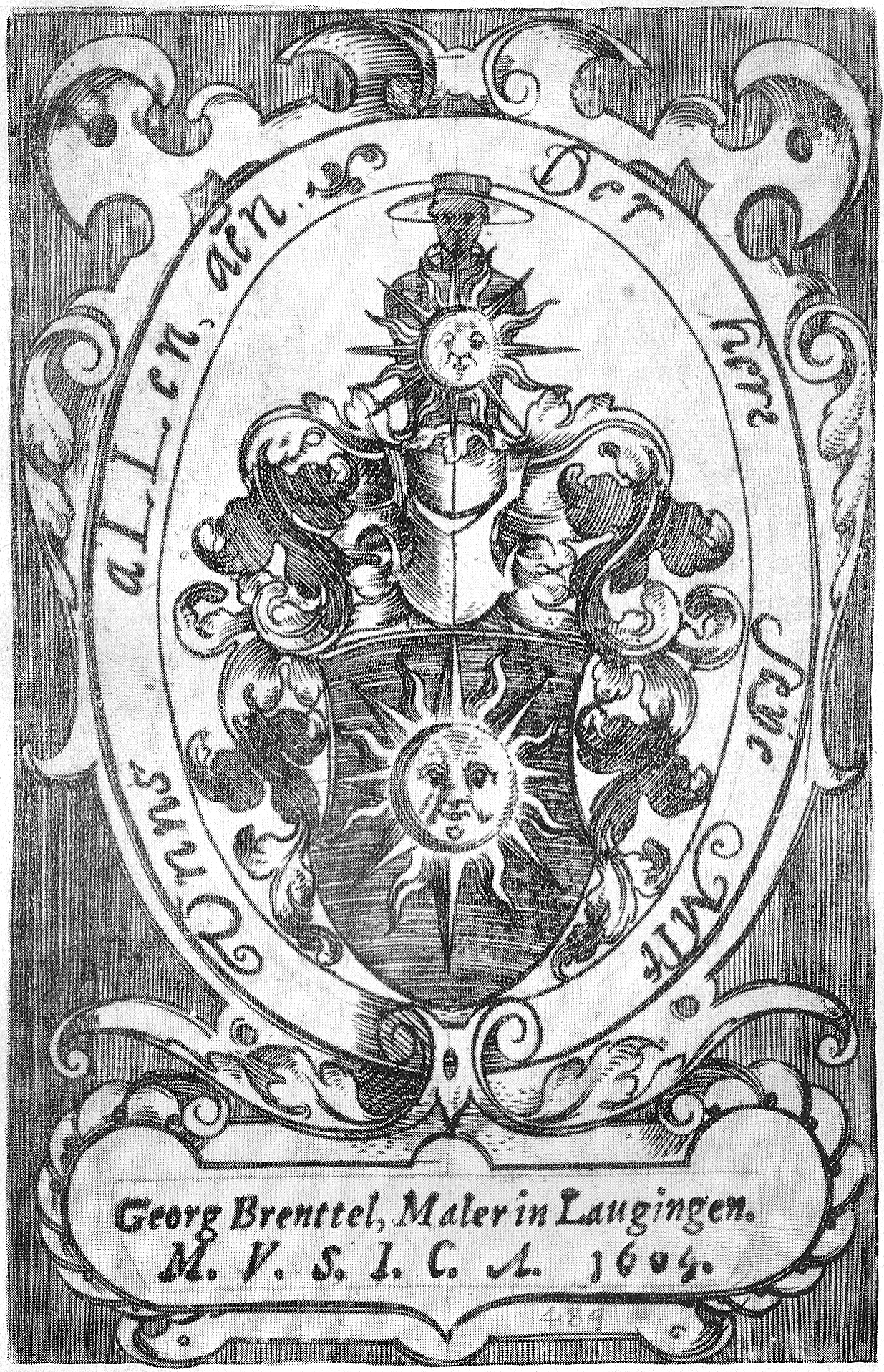 Exlibris von Georg Brentel dem Jüngeren aus dem Jahr 1613 (Kupferstich mit dem Schriftzug im Schild: „Georg Brenttel, Maler in Laugingen / M.V.S.I.C.A. 1604“ und um das Wappen: „Der Herr seÿe MIt Vnns aLLen, aēn“)